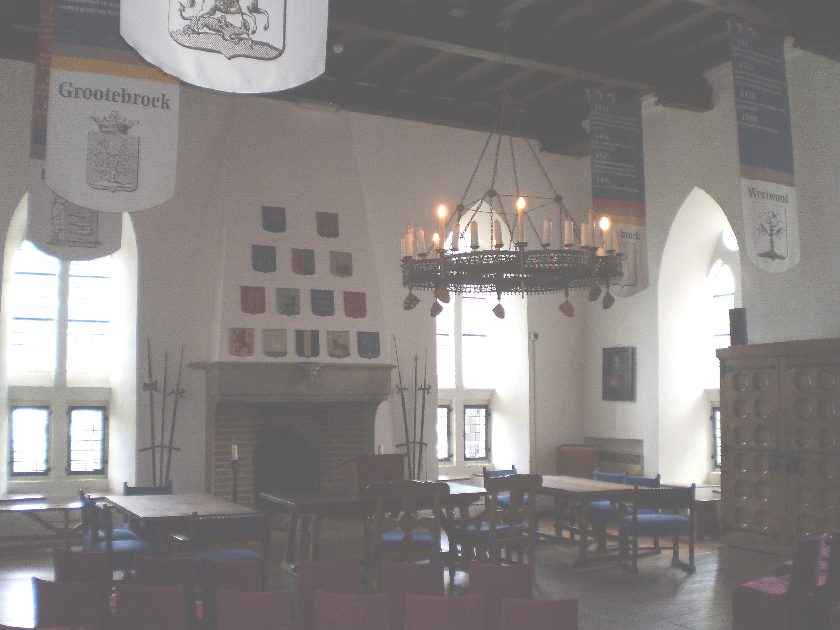 Ofbyld oanbean troch Swarte Kees op 14 augustus 2009 yn Kastiel Redbad.